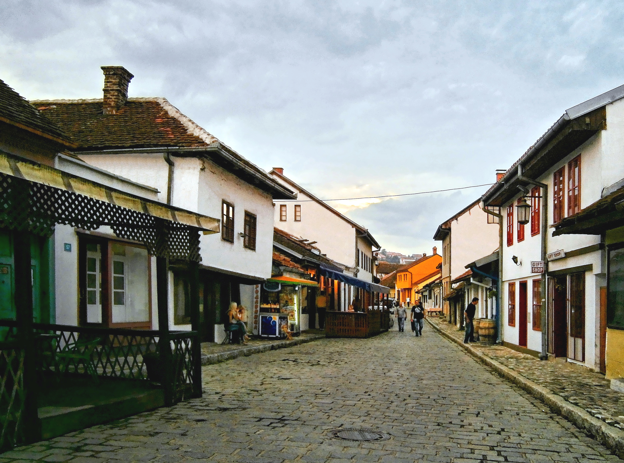 Тешњар је данас једна од ретких оријенталних целина сачуваних у Србији. Састоји се од једне улице која прати речни ток Колубаре и неколико мањих улица које се низ брдо спуштају ка њој. Већина кућа у њој настала је у 19. веку.